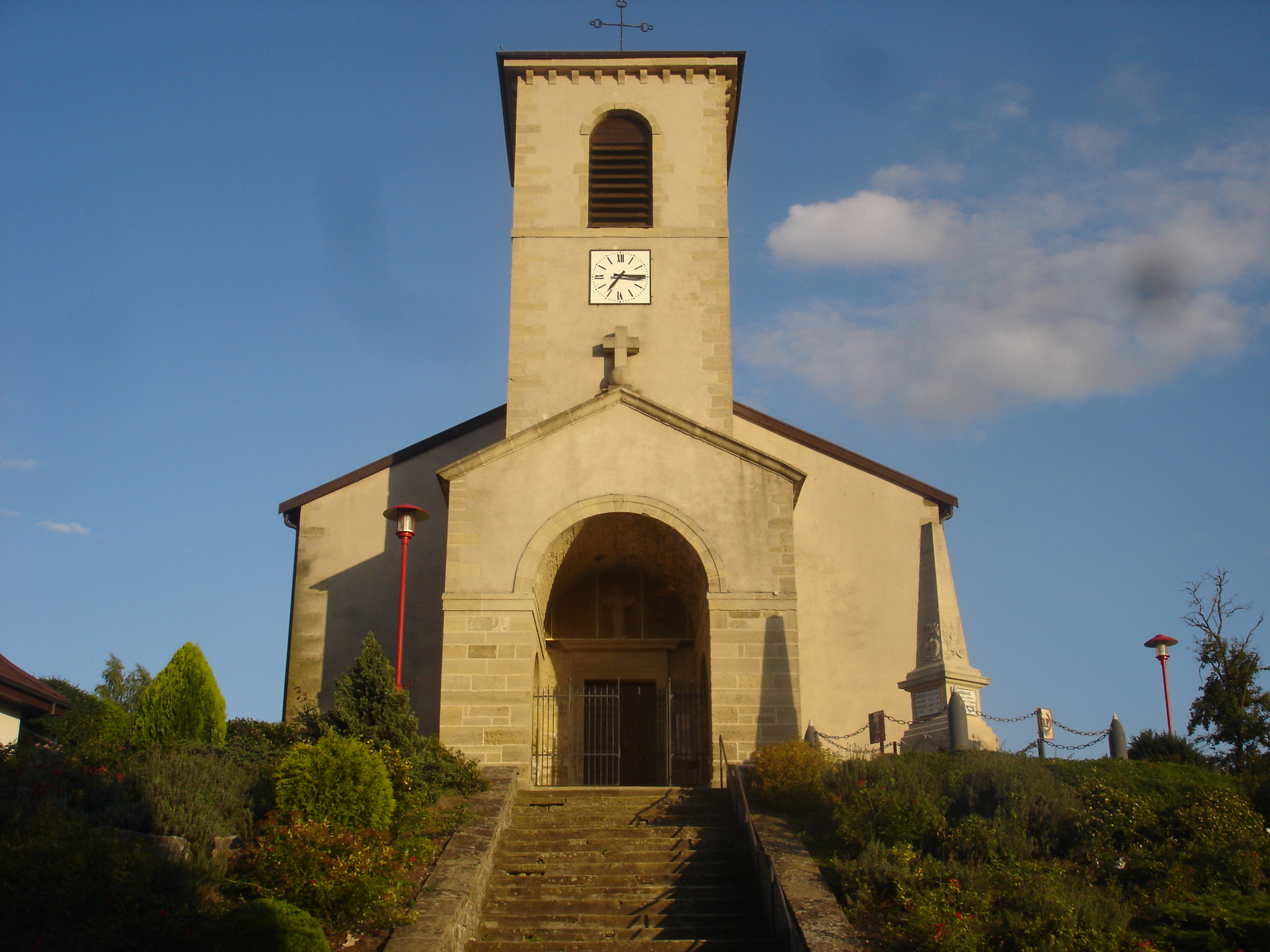 L'église Saint-Eprve de Norroy